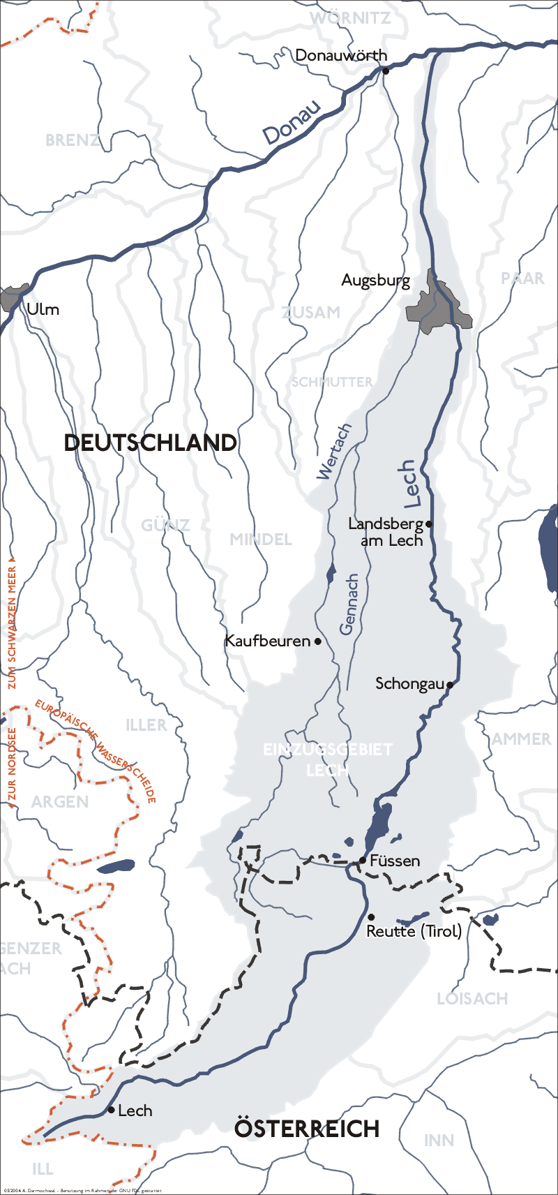 Darstellung zeigt den Einzugsbereich und Verlauf des Lech. Zeichnung erstellt 2004 von Benutzer:Sansculotte. Bild ist unter der Creative Commons Share Alike zur weiteren Verwendung freigegeben. Quellenangabe und Beleg an erbeten. Kategorie:Bild:Karte:thematisch